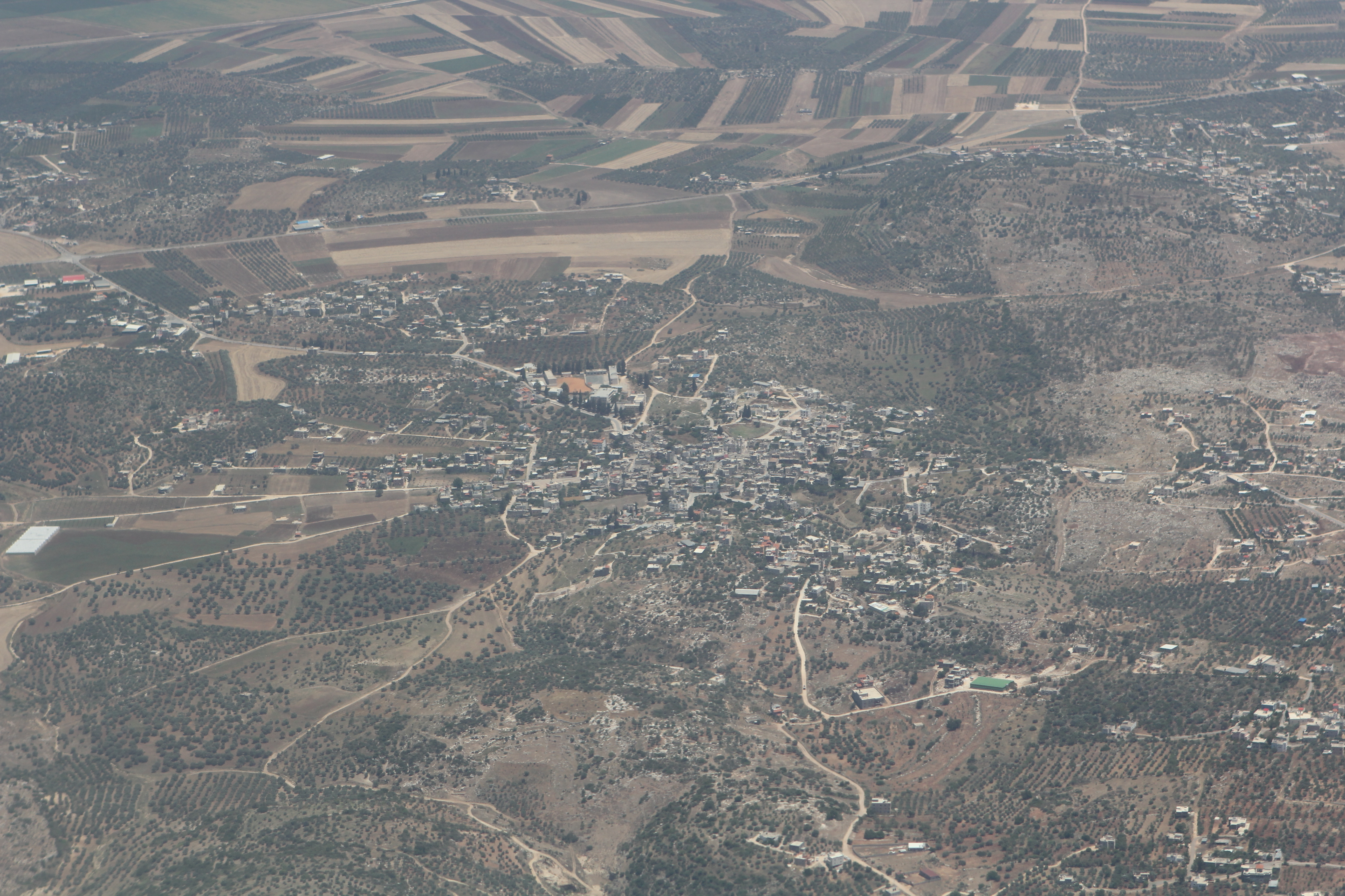 צילום אוויר של רומאנה